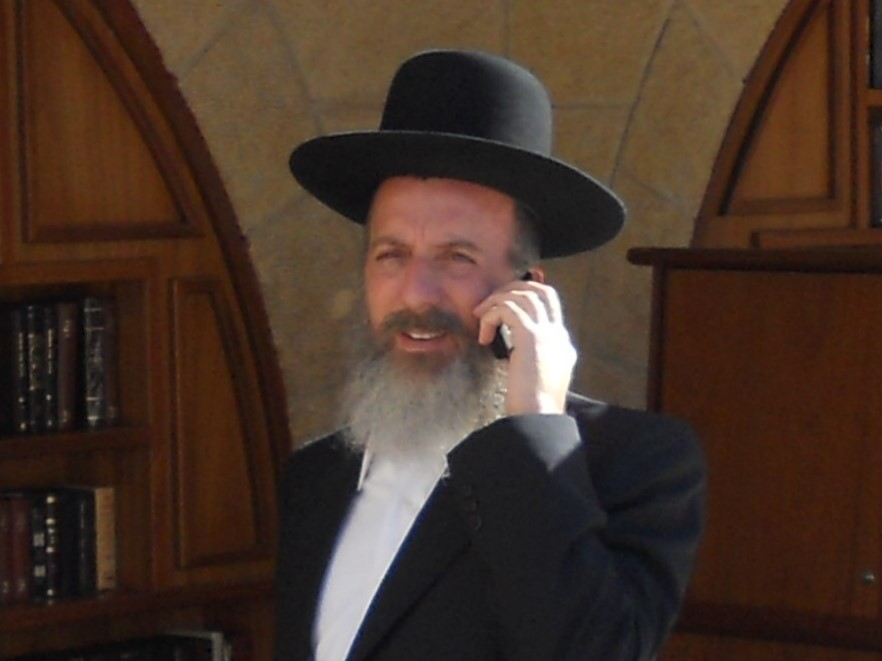 יו"ר סיעת אגודת ישראל בירושלים יוסי דייטש בכותל